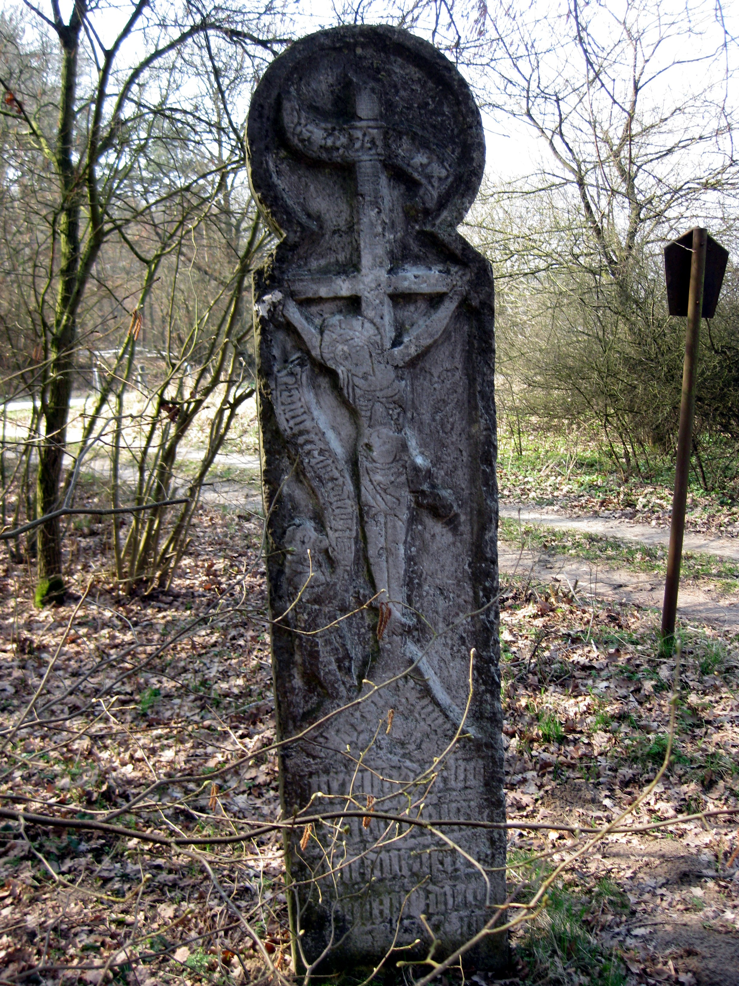 Mordwange in Sülsdorf Gemeinde Selmsdorf